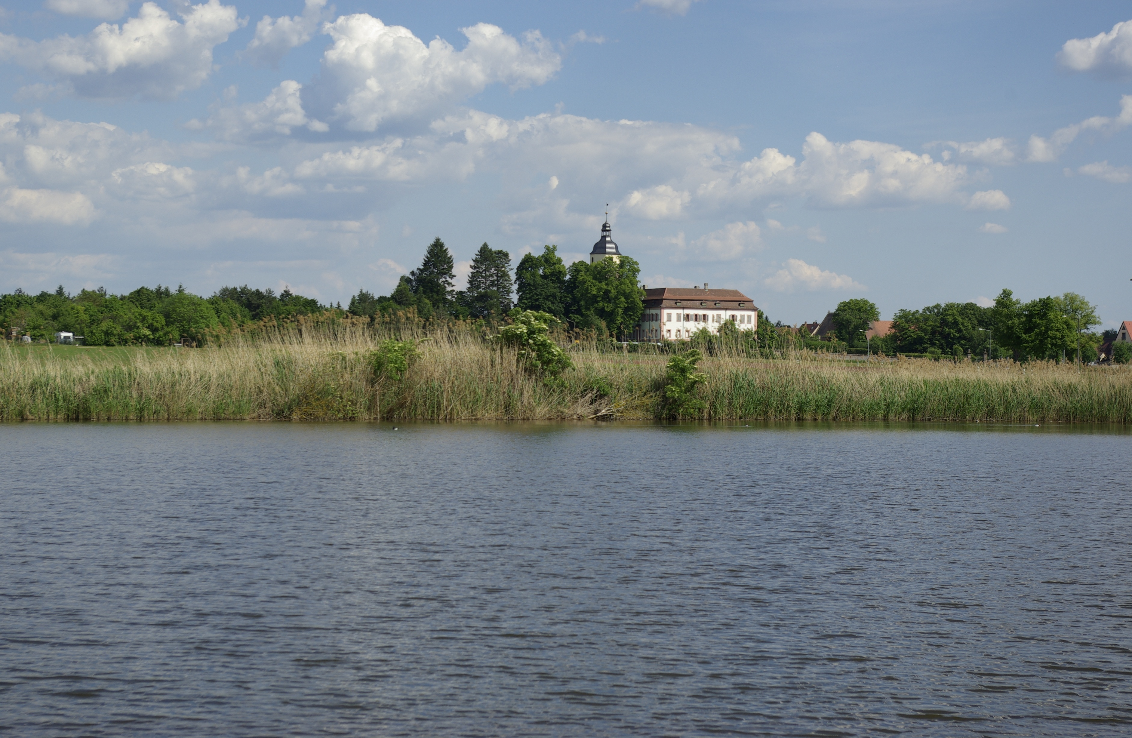 Der Schwemmweiher im Nürnberger Stadtteil Kleingründlach.